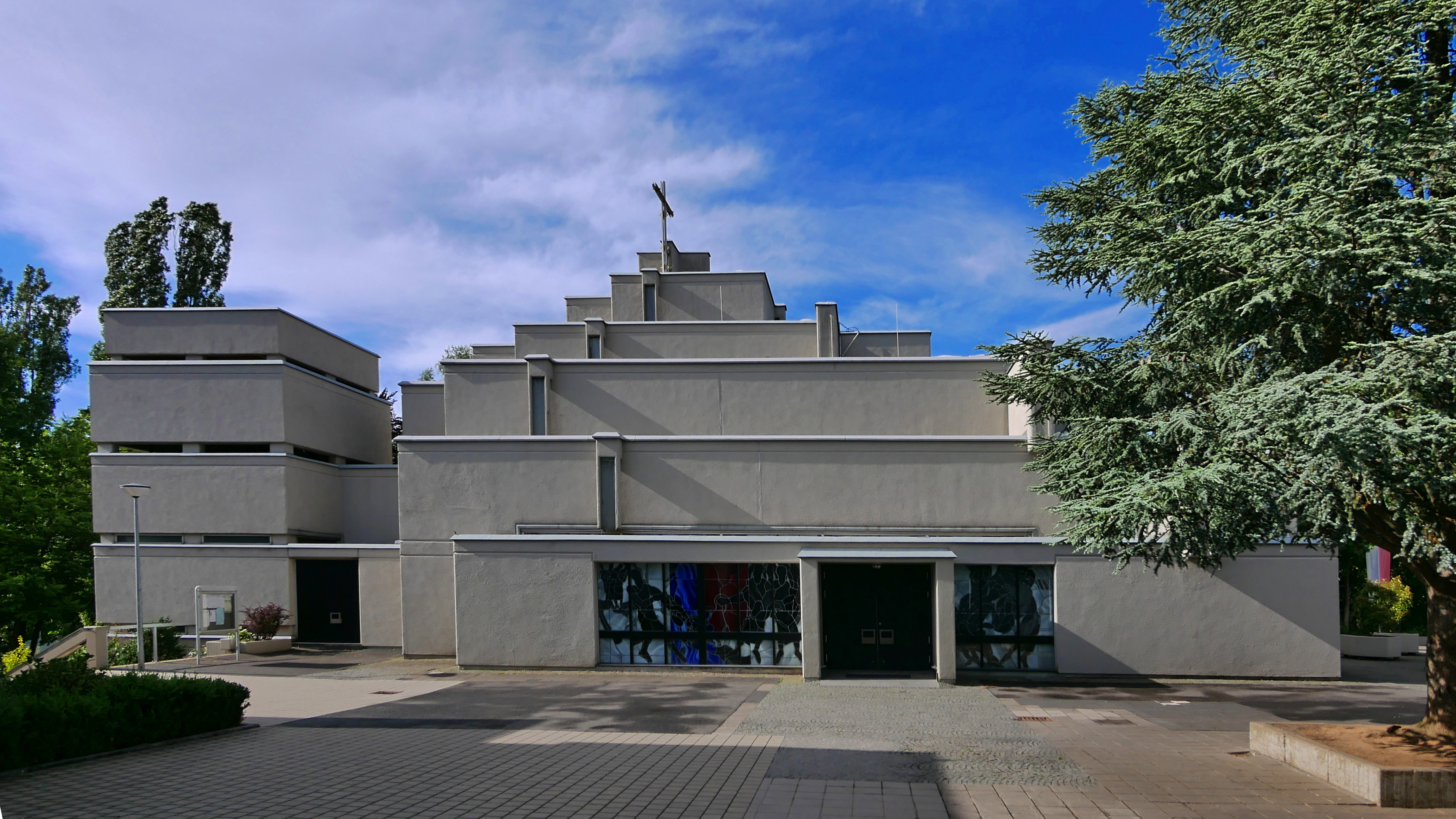 St. Michael im Trierer Stadtteil Mariahof. Der Baukörper wurde 1969 vom Architekten K. Schmitz als weiträumige Stufenpyramide errichtet.